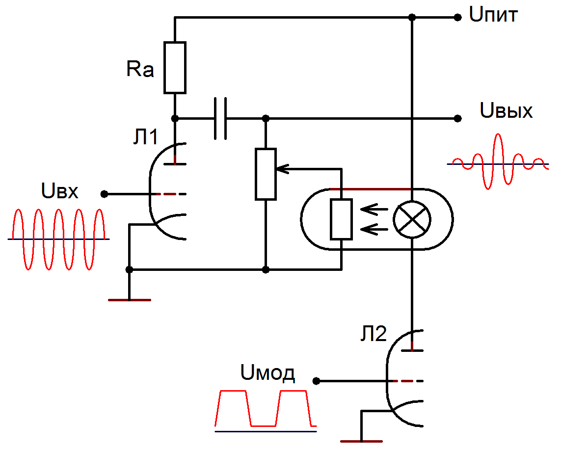 Модулятор эффекта тремоло лампового гитарного усилителя (упрощено как только можно, не показаны цепи смещения ламп, сеточные резисторы и пр. Первоисточник - схемы Gibson. В усилителях Fender вместо лампы накаливания использовалась неоновая лампа).